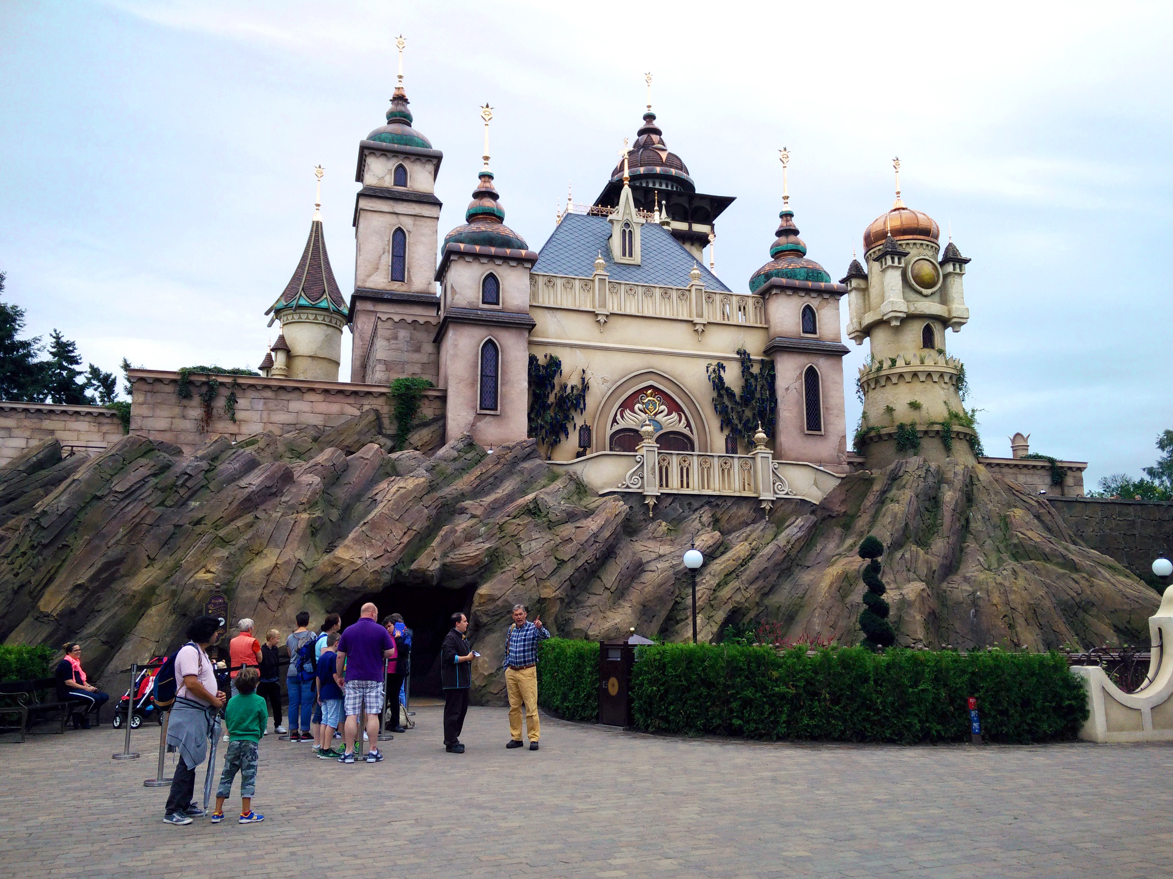 Huidige status 21-05-17